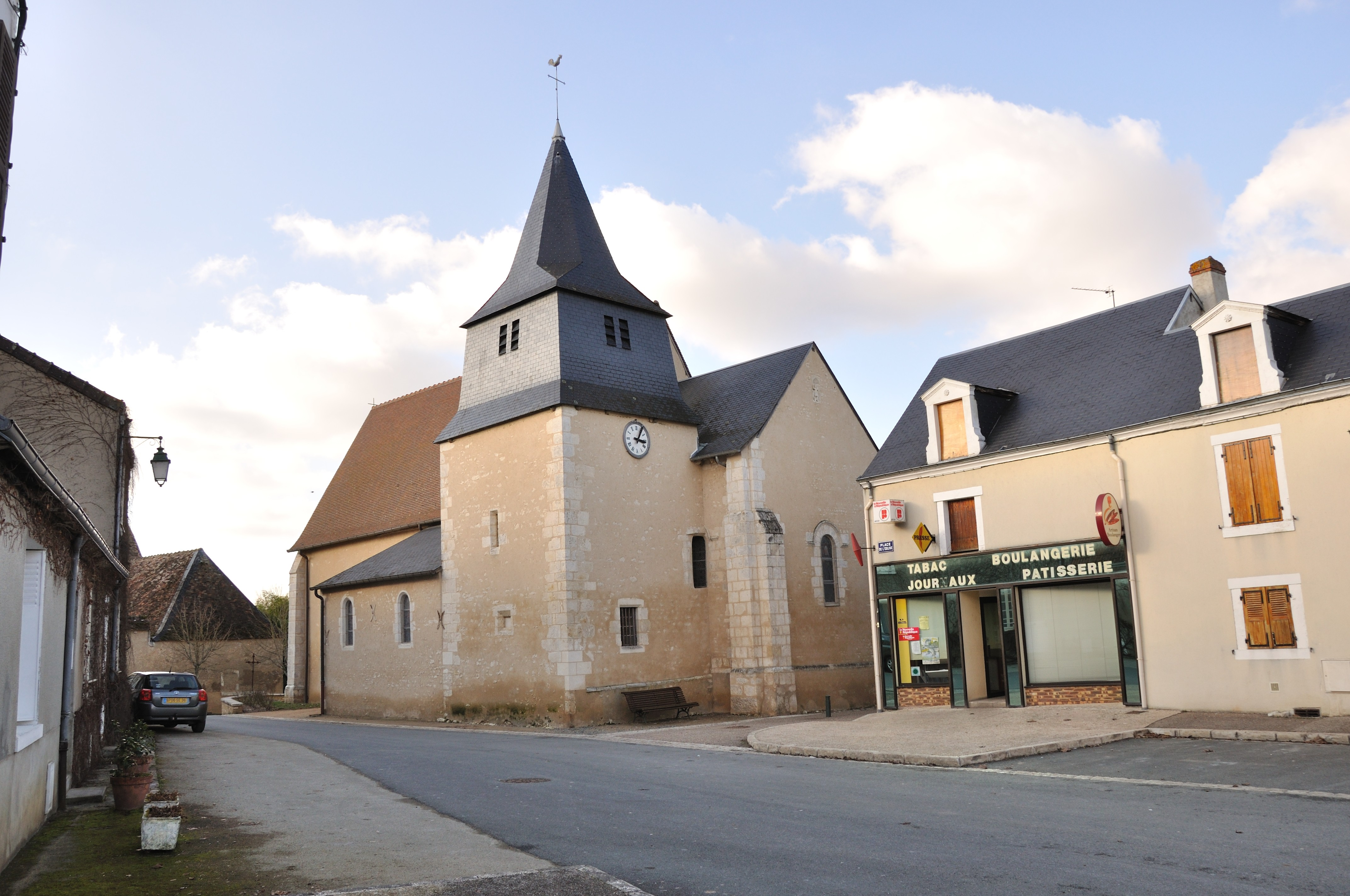 Arthon (Indre) - Place de l'église